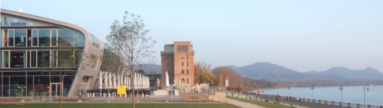 Bonner Bogen: Kameha Grand Bonn (links), die „Rohmühle“ (Mitte), der Rhein bei Bonn-Oberkassel (rechts) und das Siebengebirge im Hintergrund